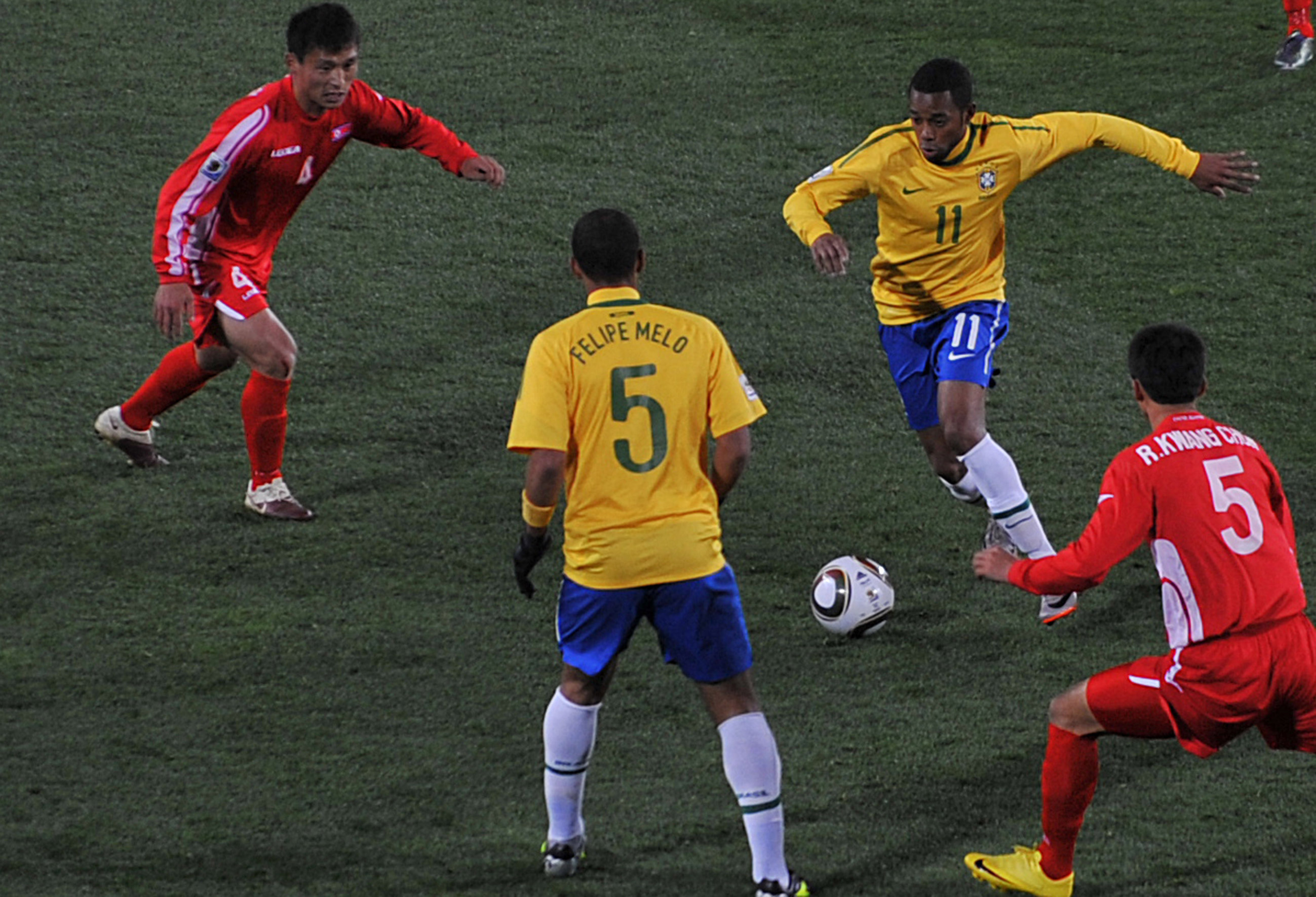 Seleção brasileira estreia na Copa do Mundo de 2010 contra a Coreia do Norte.